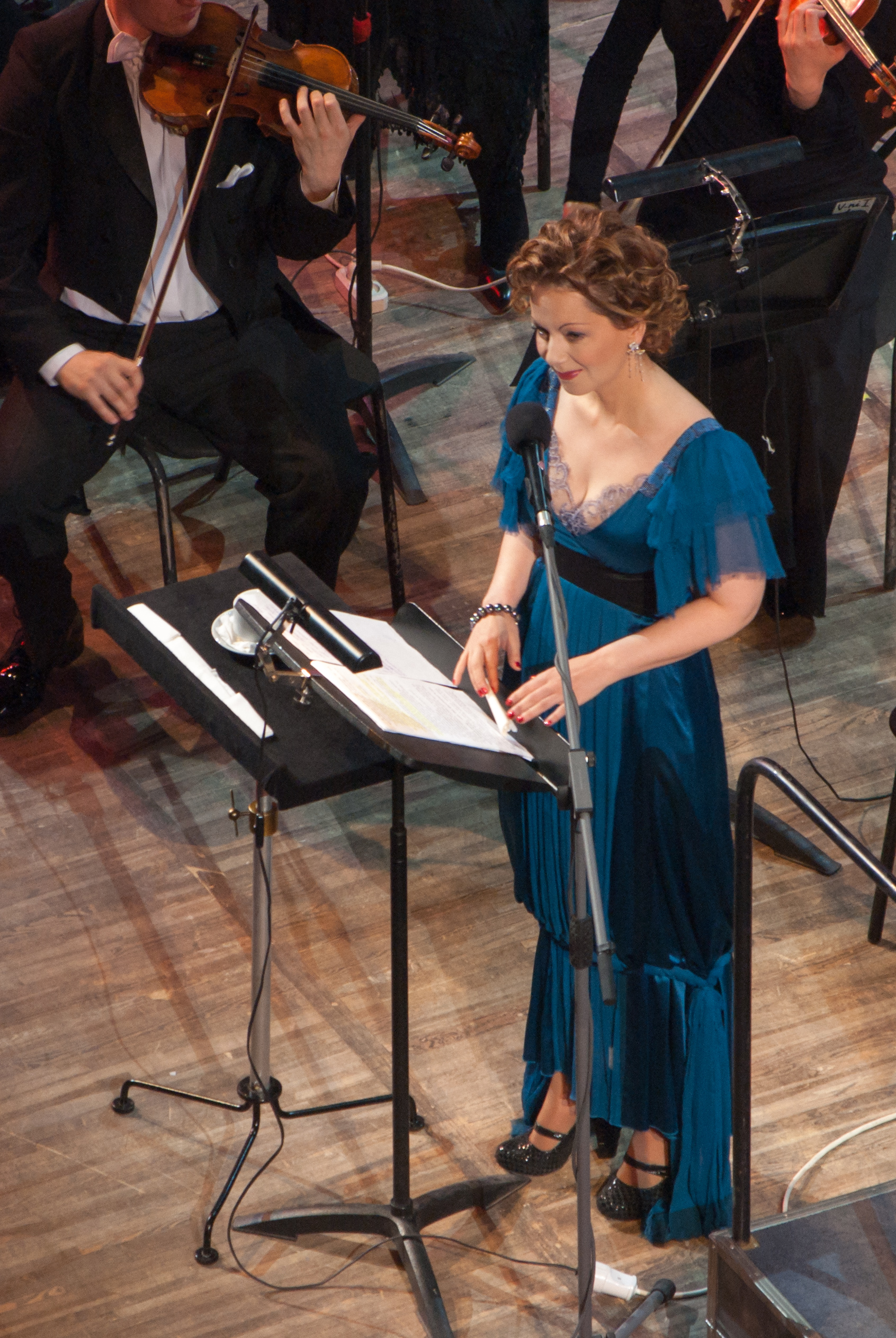 "Сказки с оркестром" Сказку Ганса-Христиана Андерсена "Снежная королева" читает Ольга Будина и Академический симфонический оркестр Московской филармонии. 19 января 2013 года.